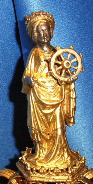 Katharina von Alexandrien, kleine vergoldete Silberfigur der Hl. Katharina datiert um 1401. Die Figur ist Teil des Szepters der Philosophischen Fakultät der Universität Wien.